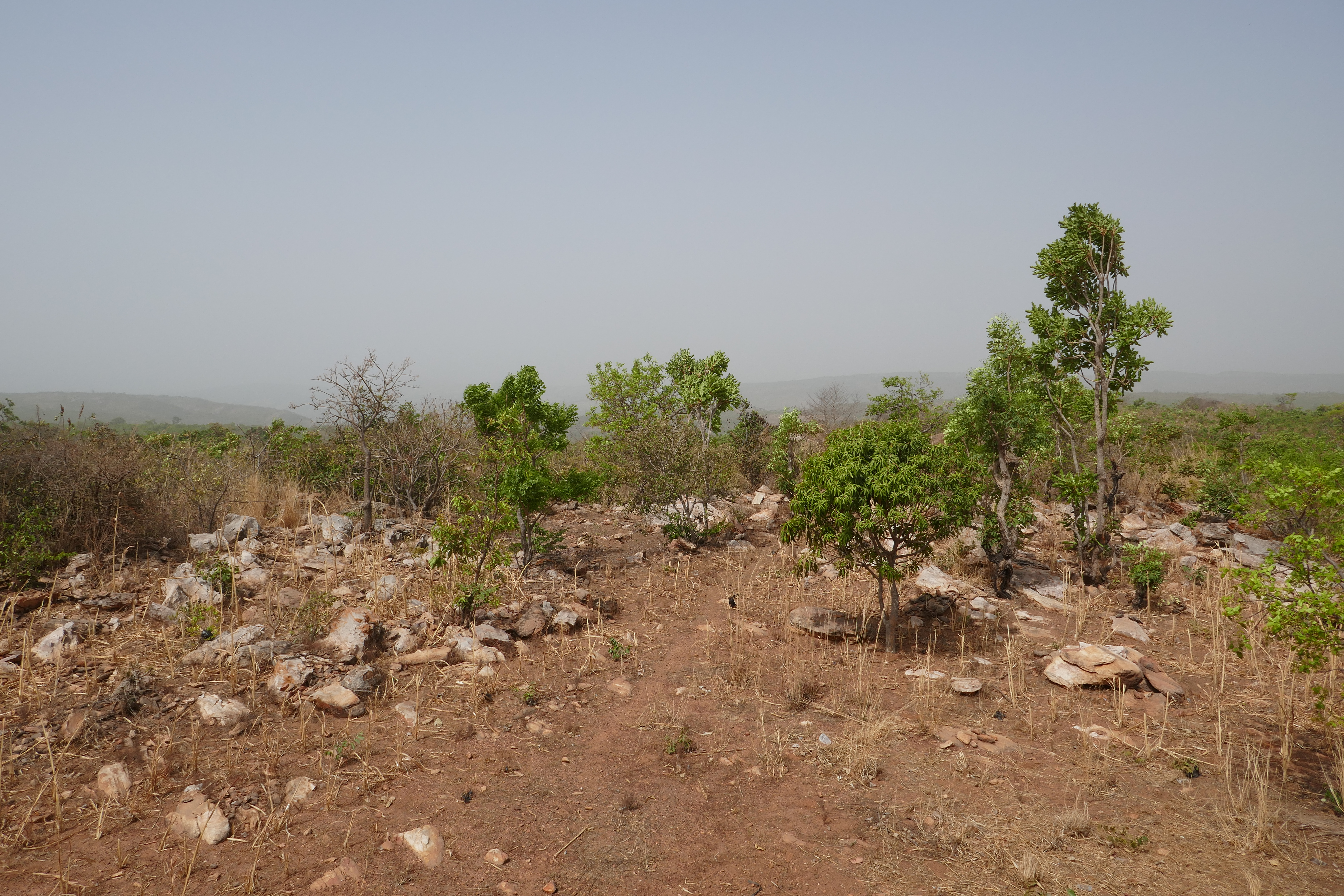 Paysage à Kouaba (commune de Natitingou, Bénin).